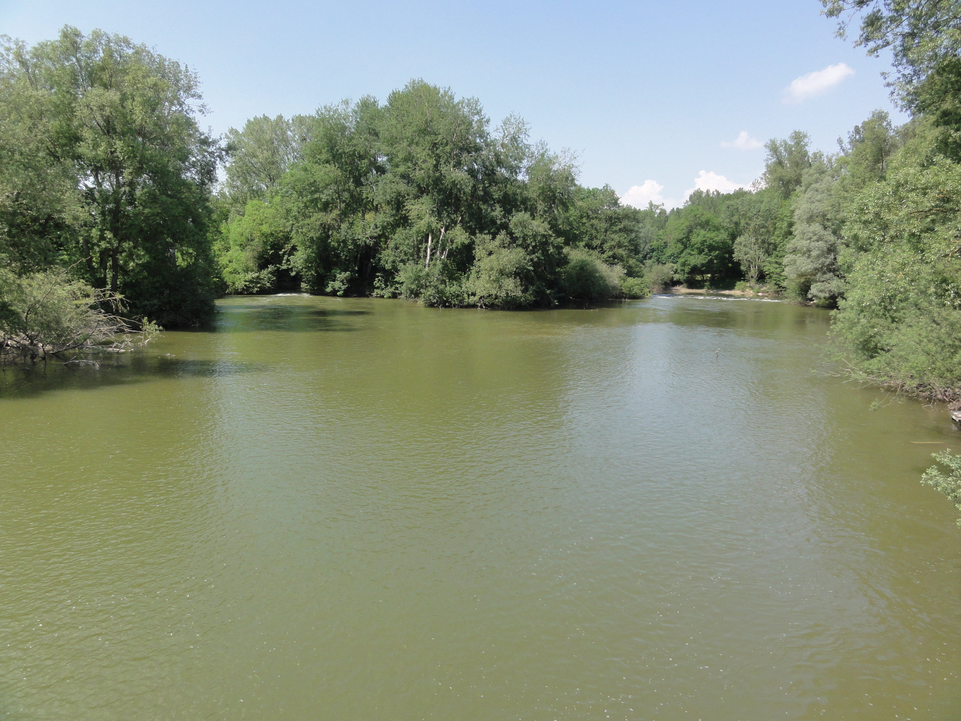 Balham (Ardennnes) L'Aisne